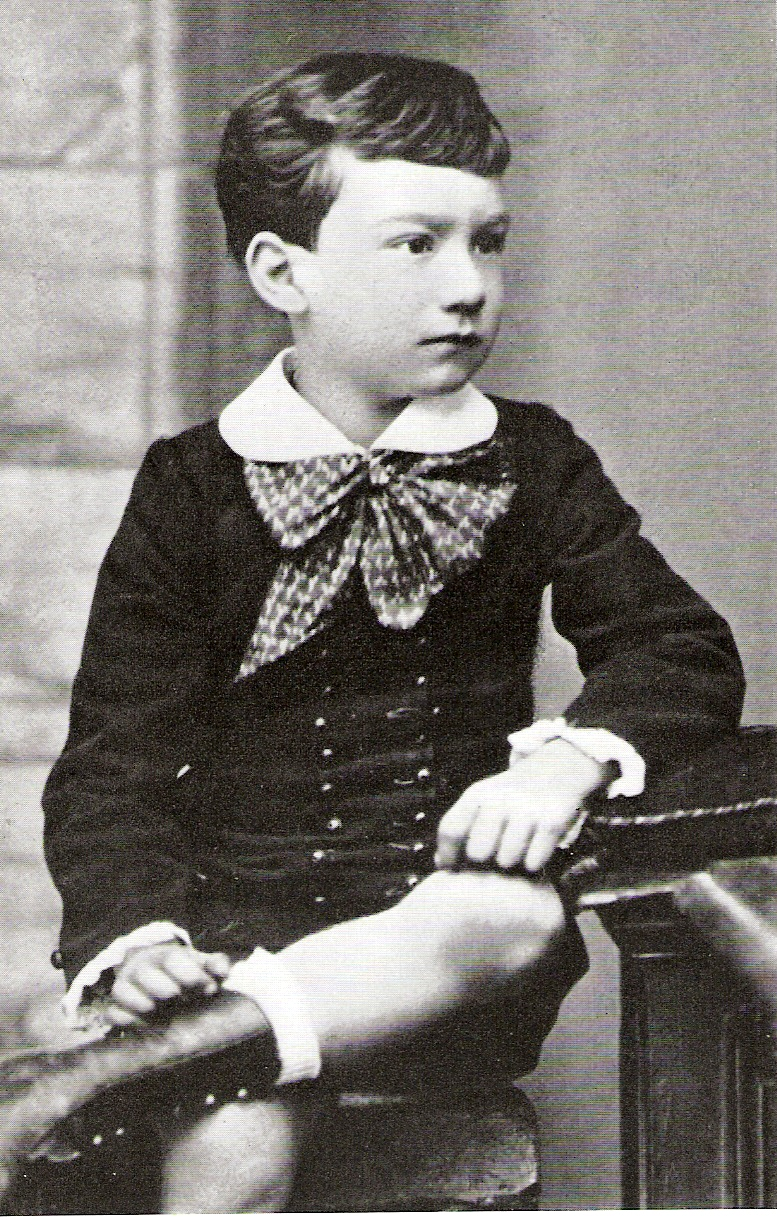 Theodor Däubler im Jahr 1886